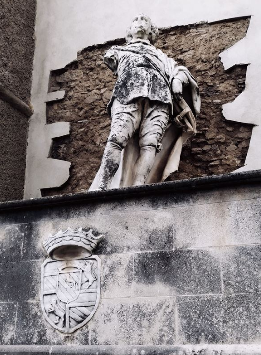 Statua del Duca Fabrizio Caracciolo Pisquizi, palazzo Ducale di Girifalco